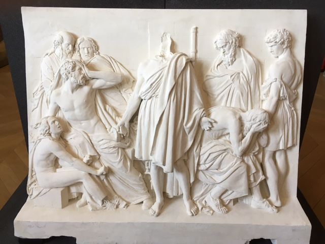 Jean-Marie Bonnassieux, Socrate buvant la cigüe, 1836, plâtre, Paris, école nationale supérieure des Beaux-Arts